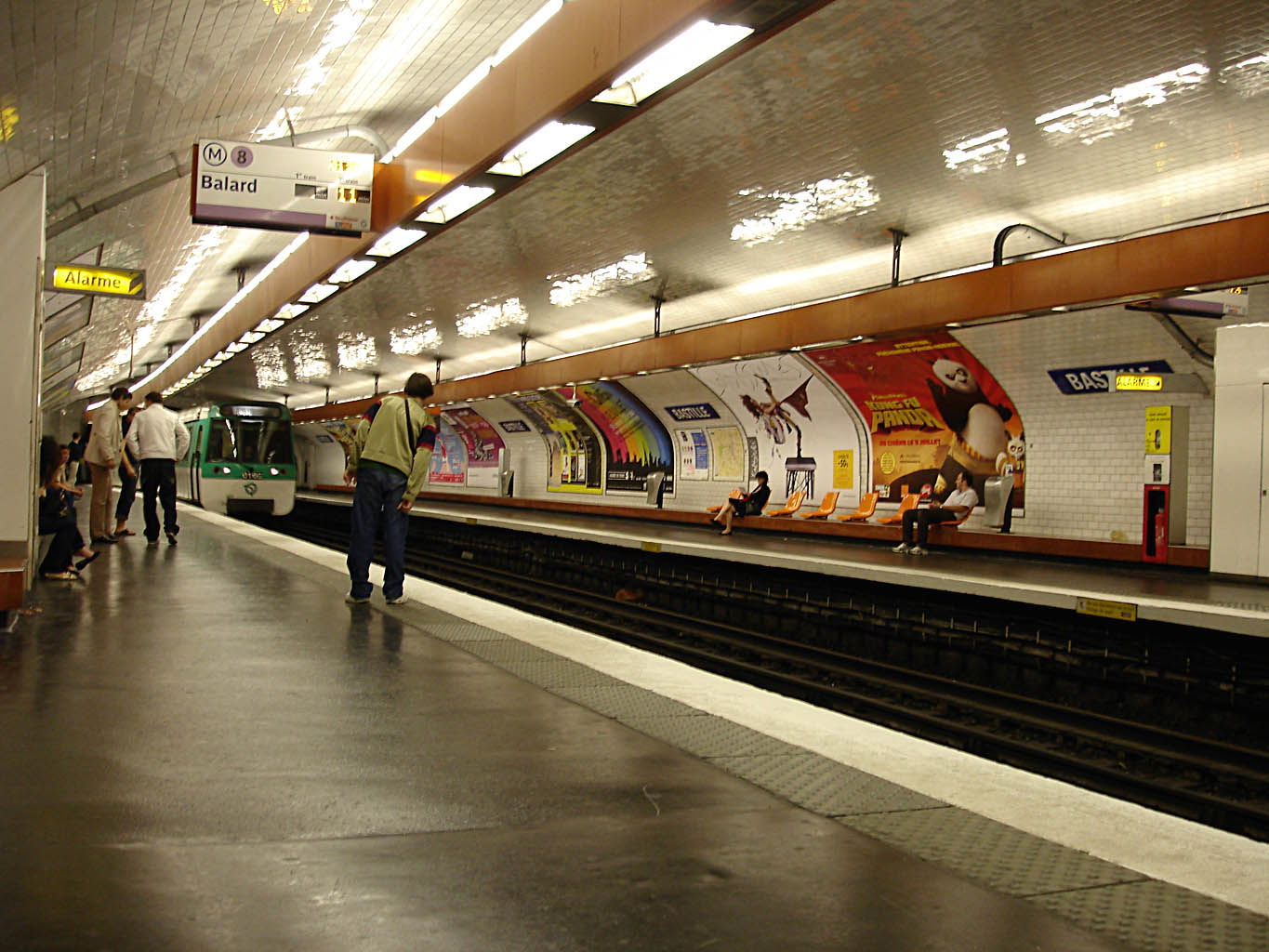 La station Bastille de la ligne 8 du métro de Paris, France